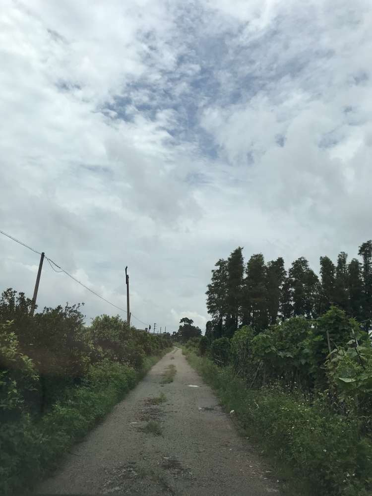 中文（香港）: 位於新會司前鎮談雅鄉潮塘里東側的新寧鐵路路基遺跡